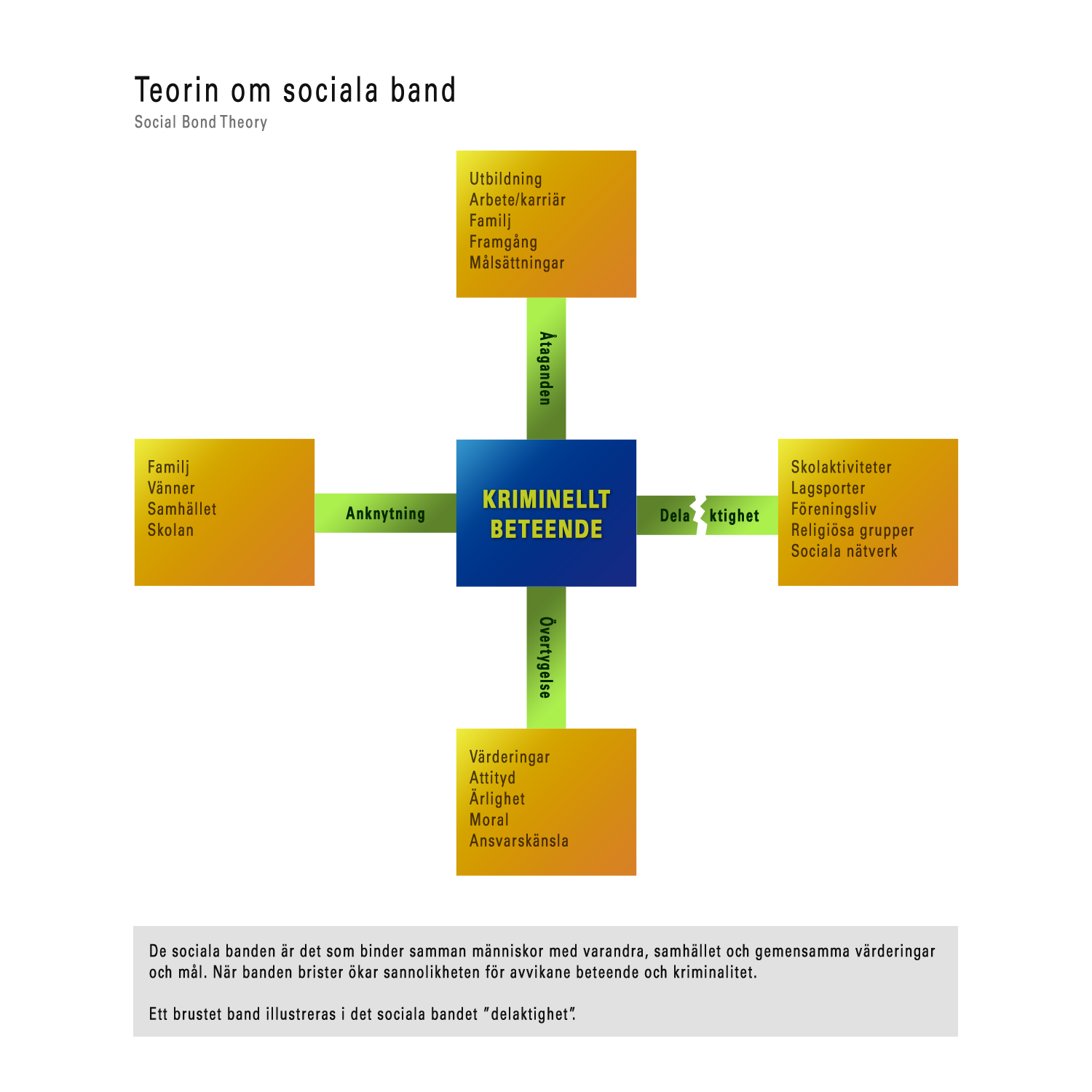 Bilden är en illustration av de sociala banden i sociala bandteorin.